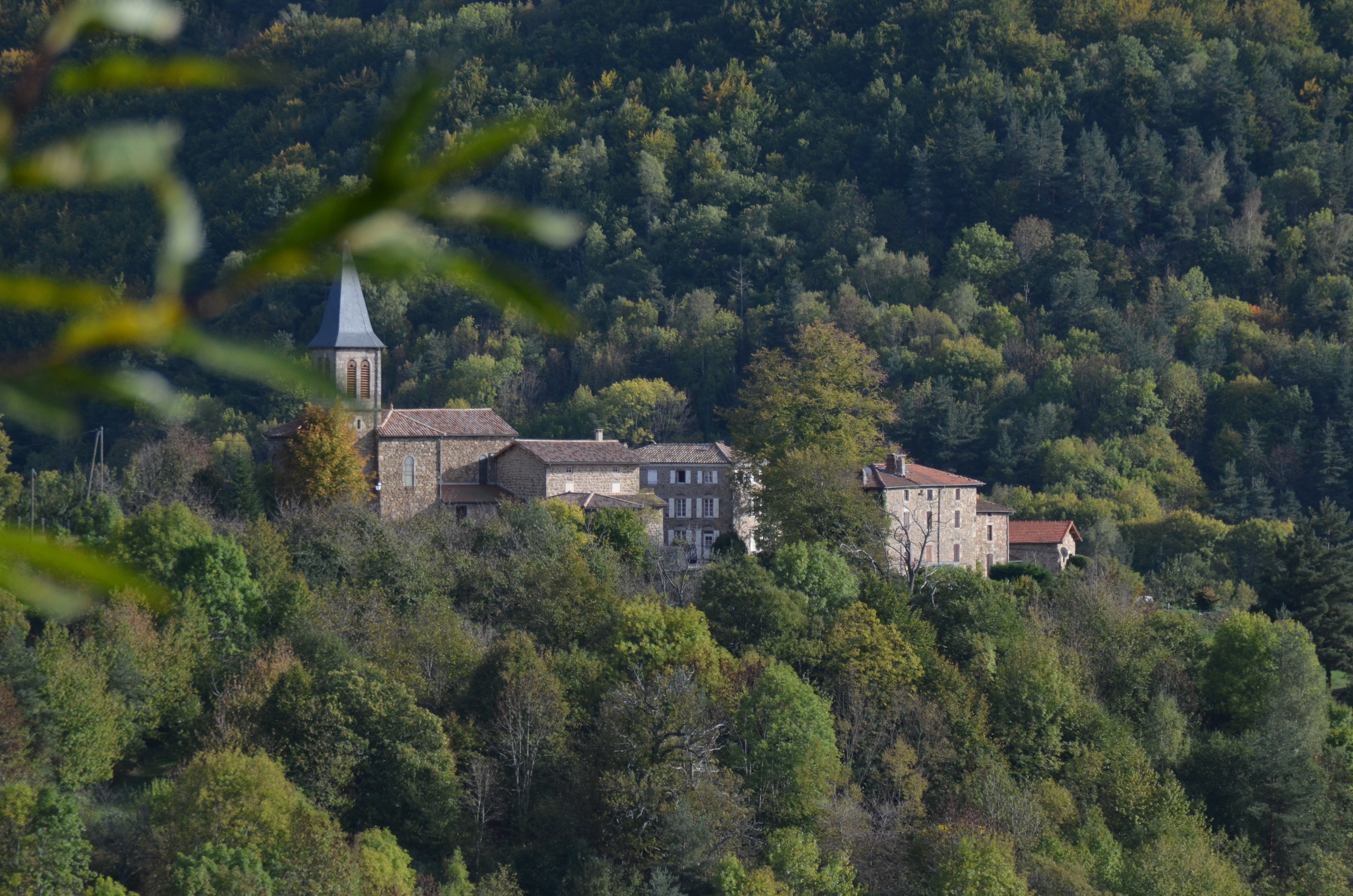 Vue générale du hameau vu de l'est, en 2014